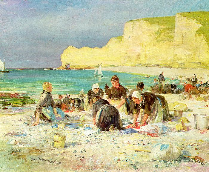 Etretat